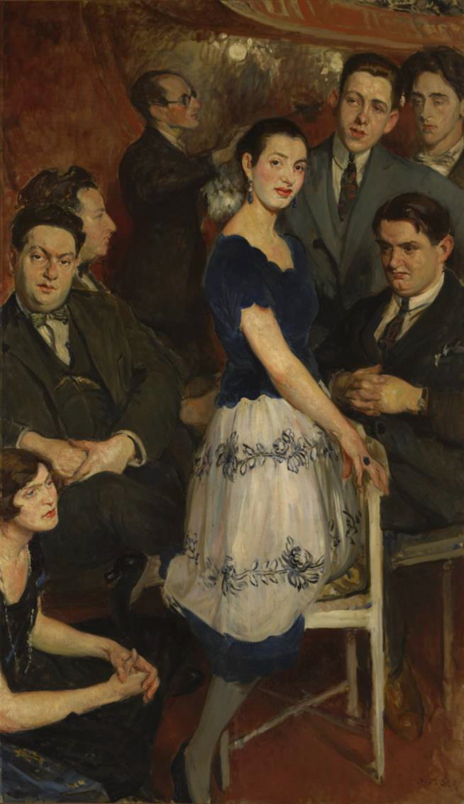 Le groupe des six, huile sur toile de Jacques-Émile Blanche, 1922. 190,5 x 112 cm. Musée des Beaux-Arts de Rouen.Seuls cinq des Six sont représentés, Louis Durey étant absent. Au centre : la pianiste Marcelle Meyer. À gauche, de bas en haut : Germaine Tailleferre, Darius Milhaud, Arthur Honegger, Jean Wiener. À droite, debout : Francis Poulenc, Jean Cocteau et assis : Georges Auric.